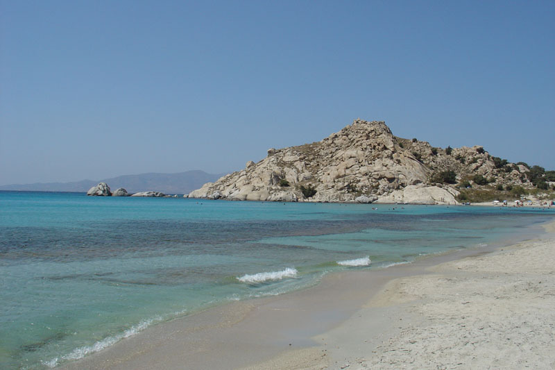 Mikri Vigla beach